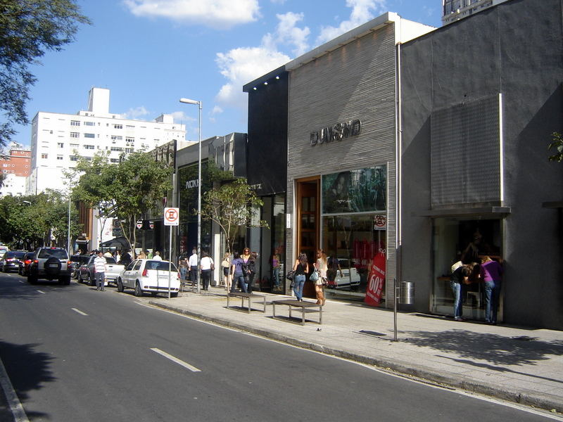 Rua Oscar Freite, na cidade de São Paulo, Brasil.